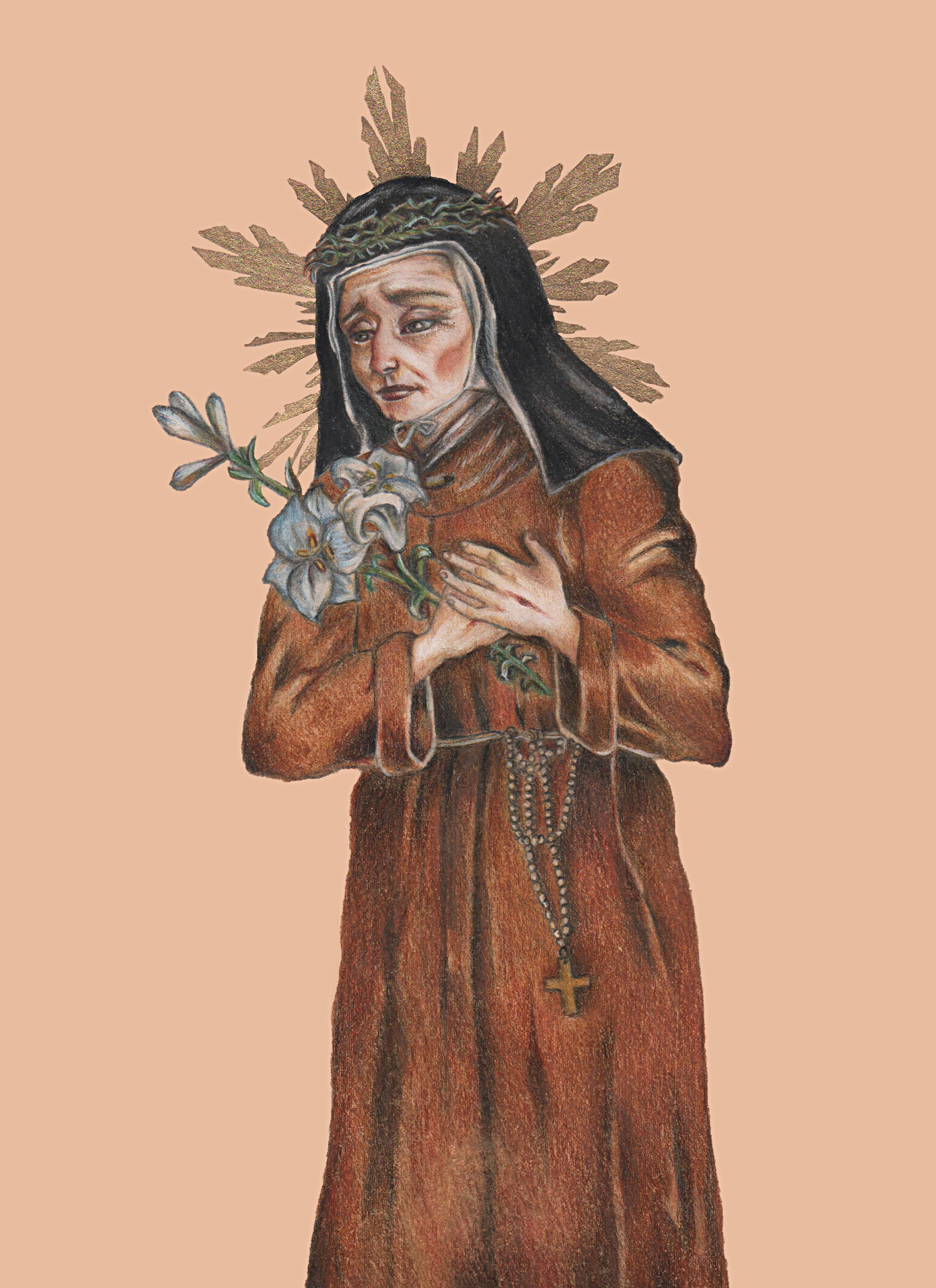 Santa Maria Francesca delle cinque piaghe, illustrazione di Daniela Matarazzo